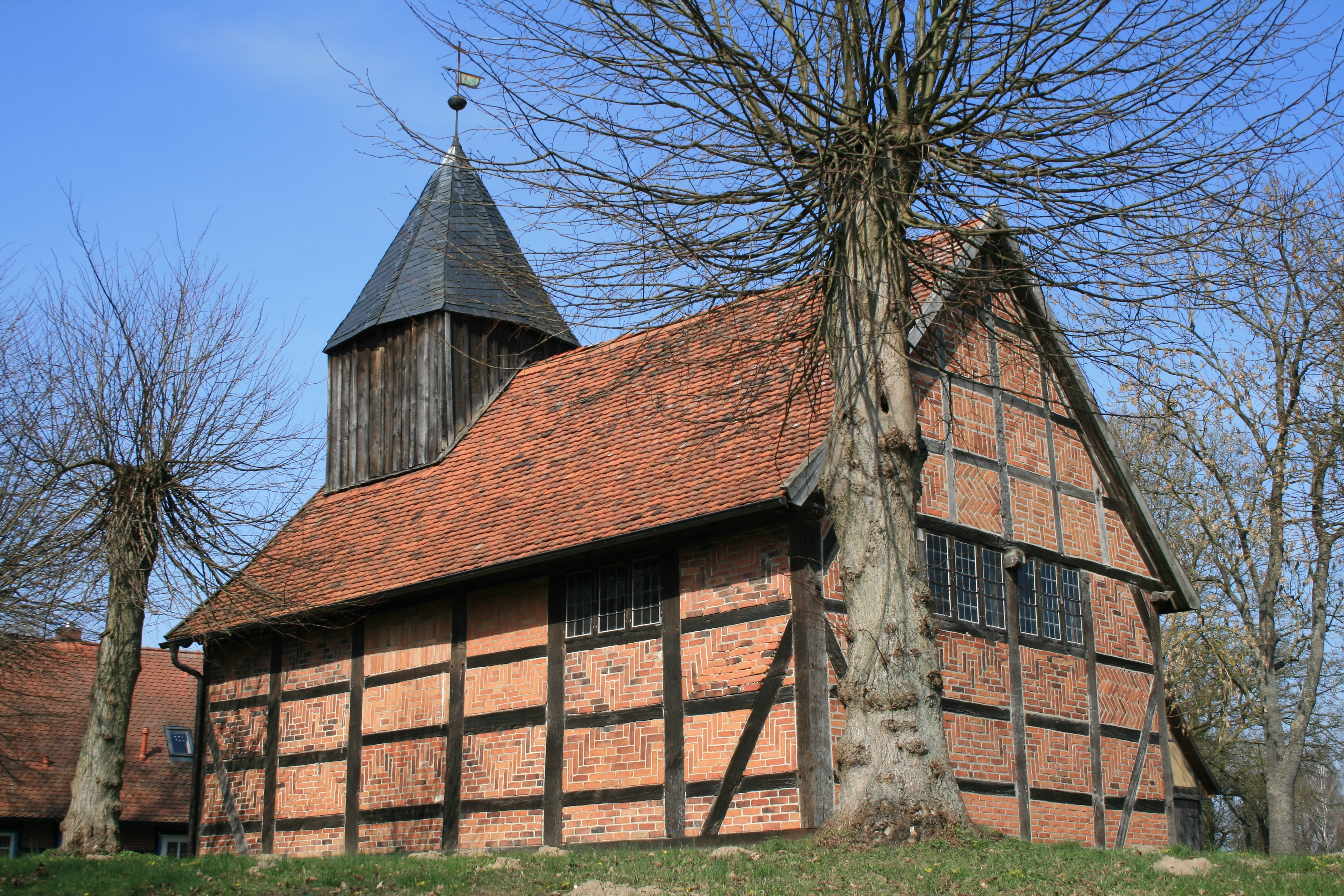 Dorfkirche Wootz, Südwestansicht